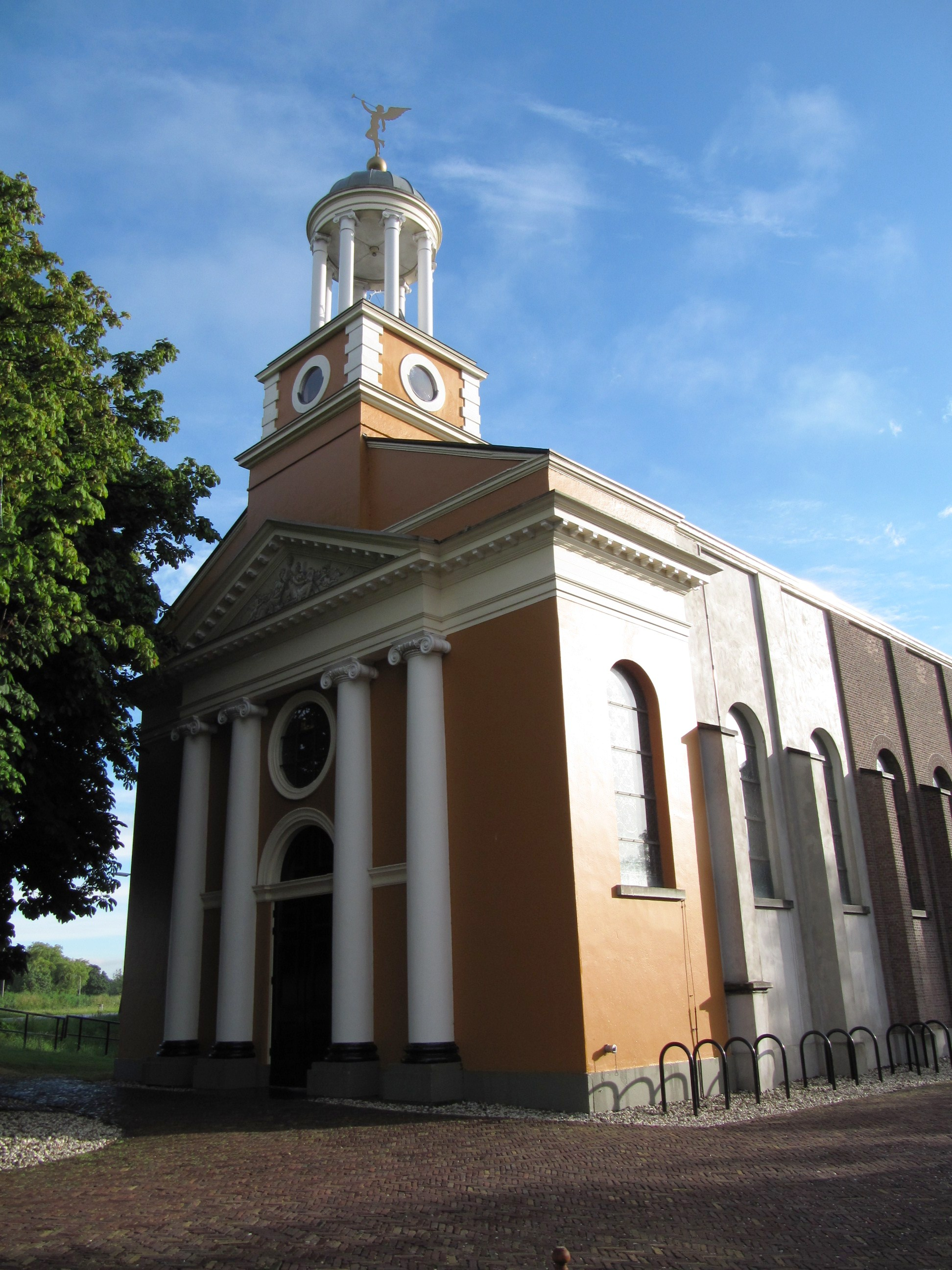 Hodenpijl